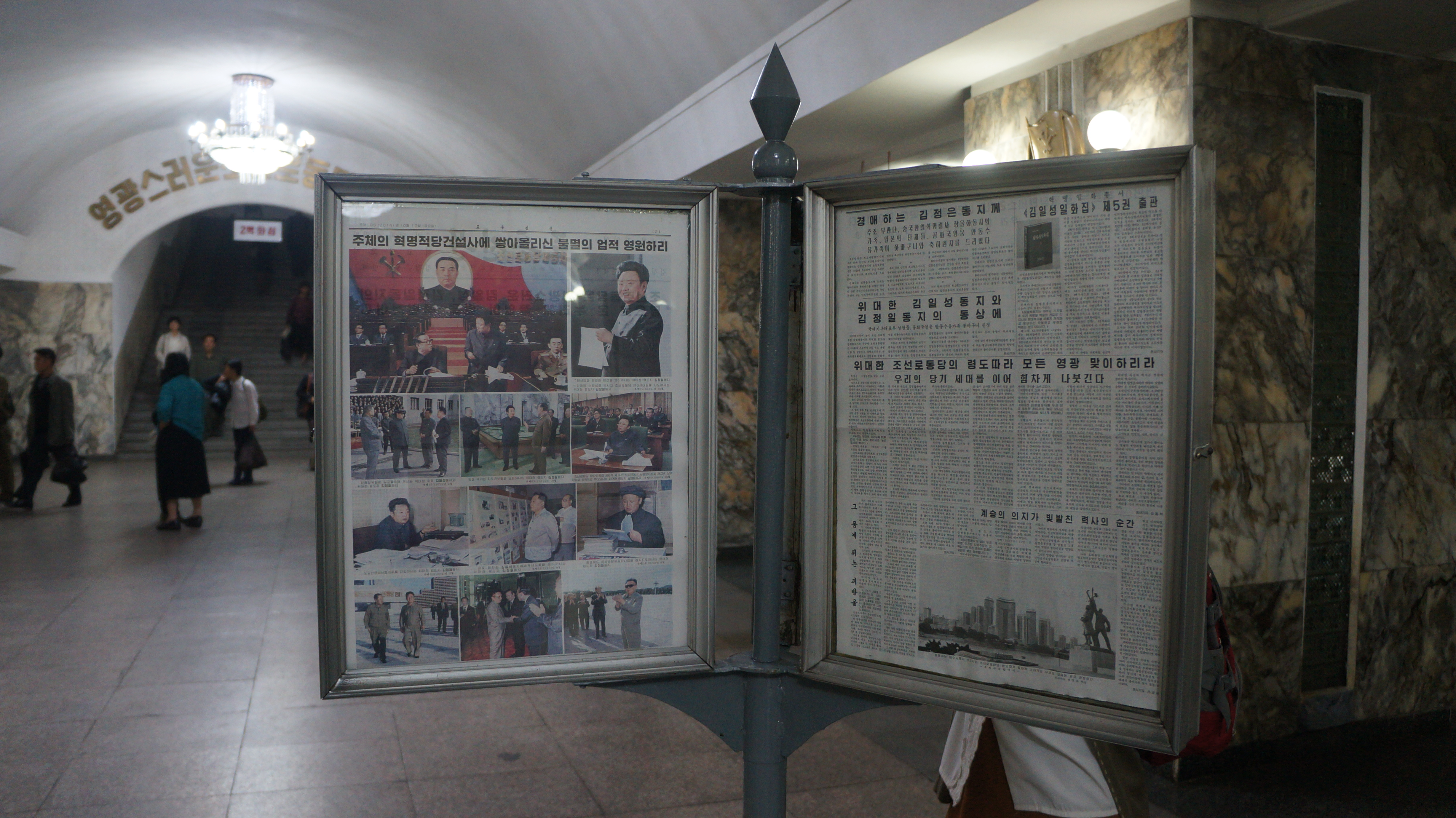 Rodong Sinmun on display in the Pyongyang Metro